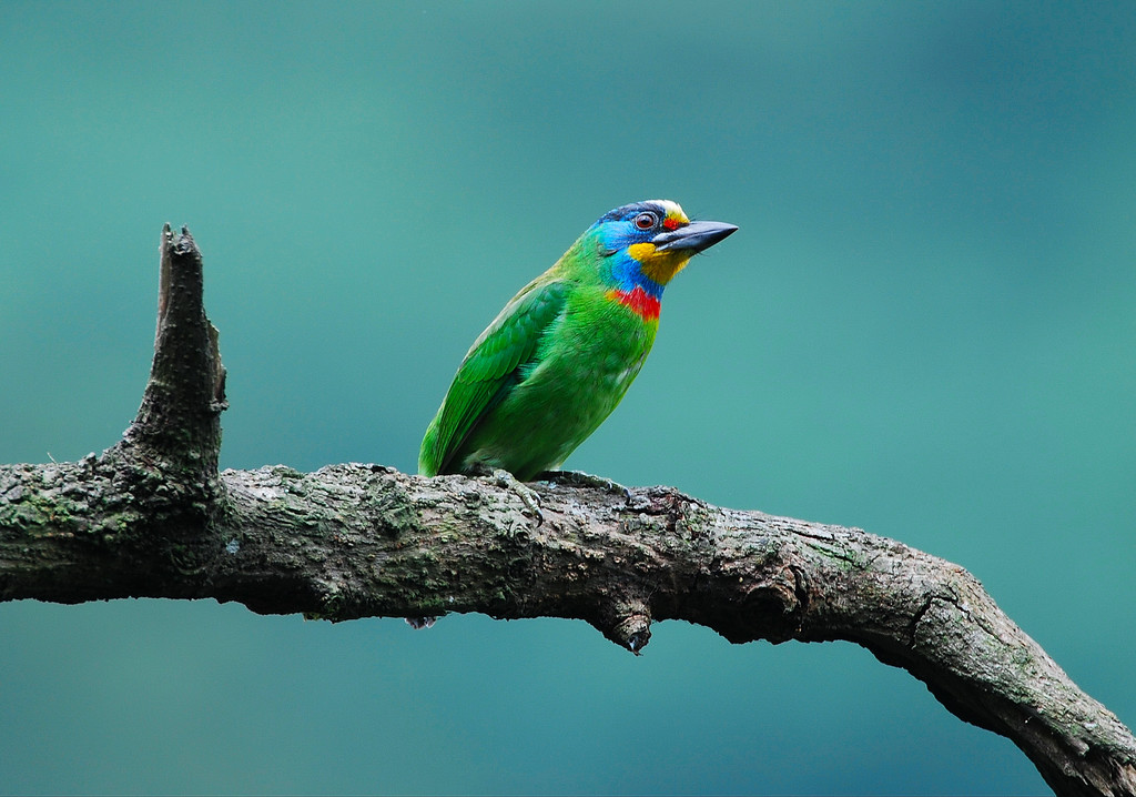 Taiwan Barbet Barbet Megalaima nuchalis (Megalaima oorti nuchalis)